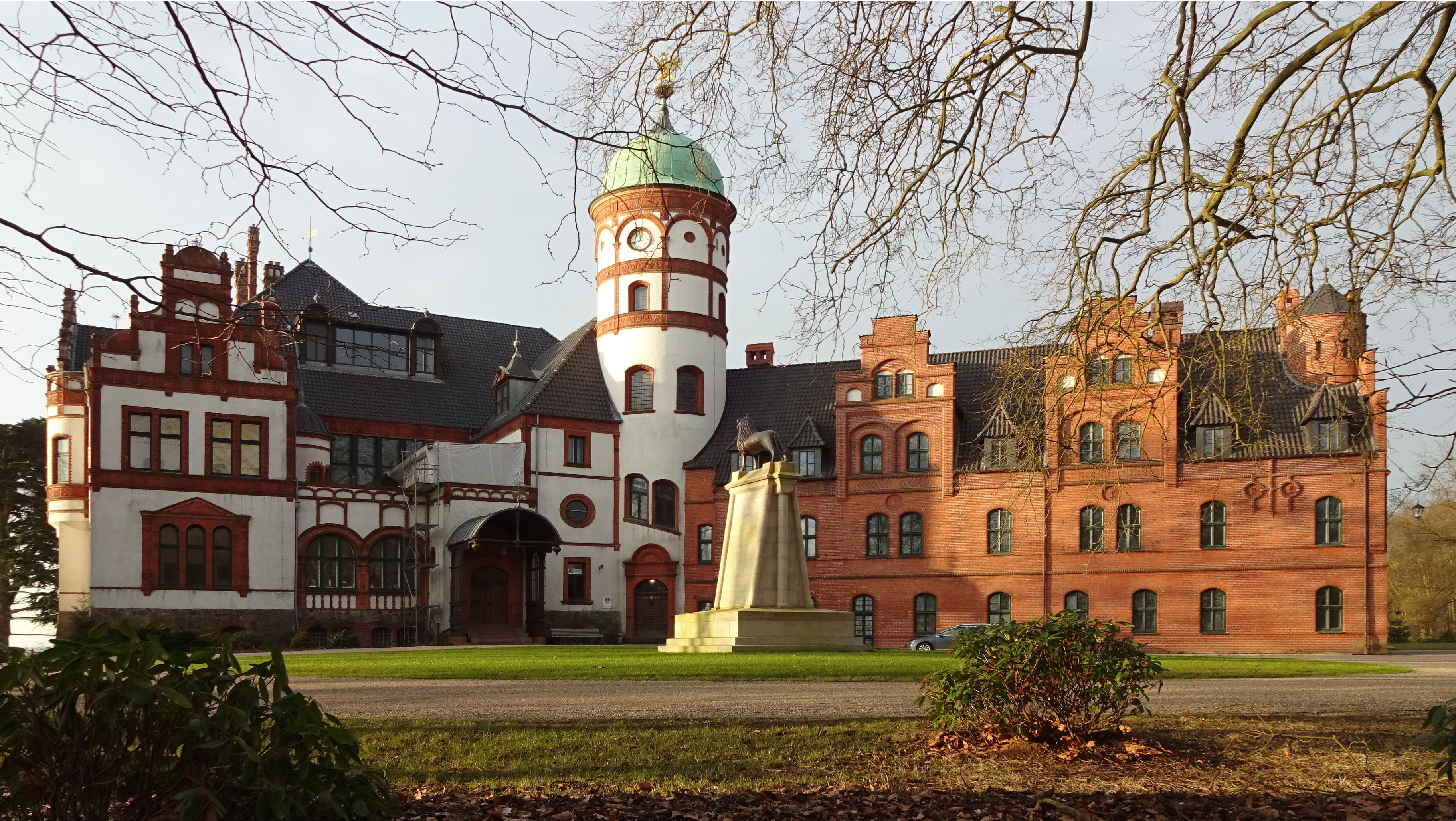 Schloss Wiligrad, Empfangsseite mit Schlosshof, Febr. 2015